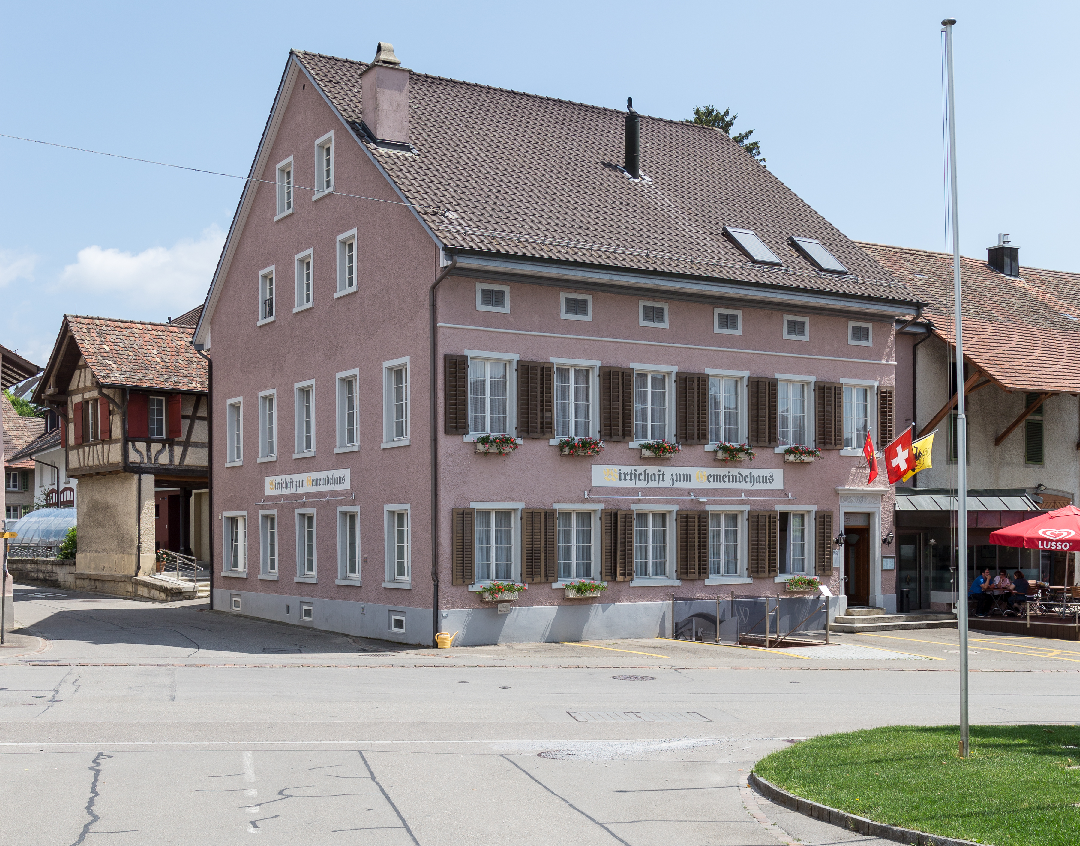 Restaurant Gemeindehaus